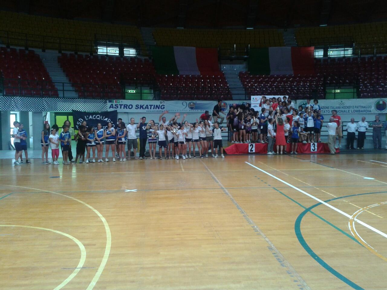 Campionati Italiani Freestyle FIHP 2012